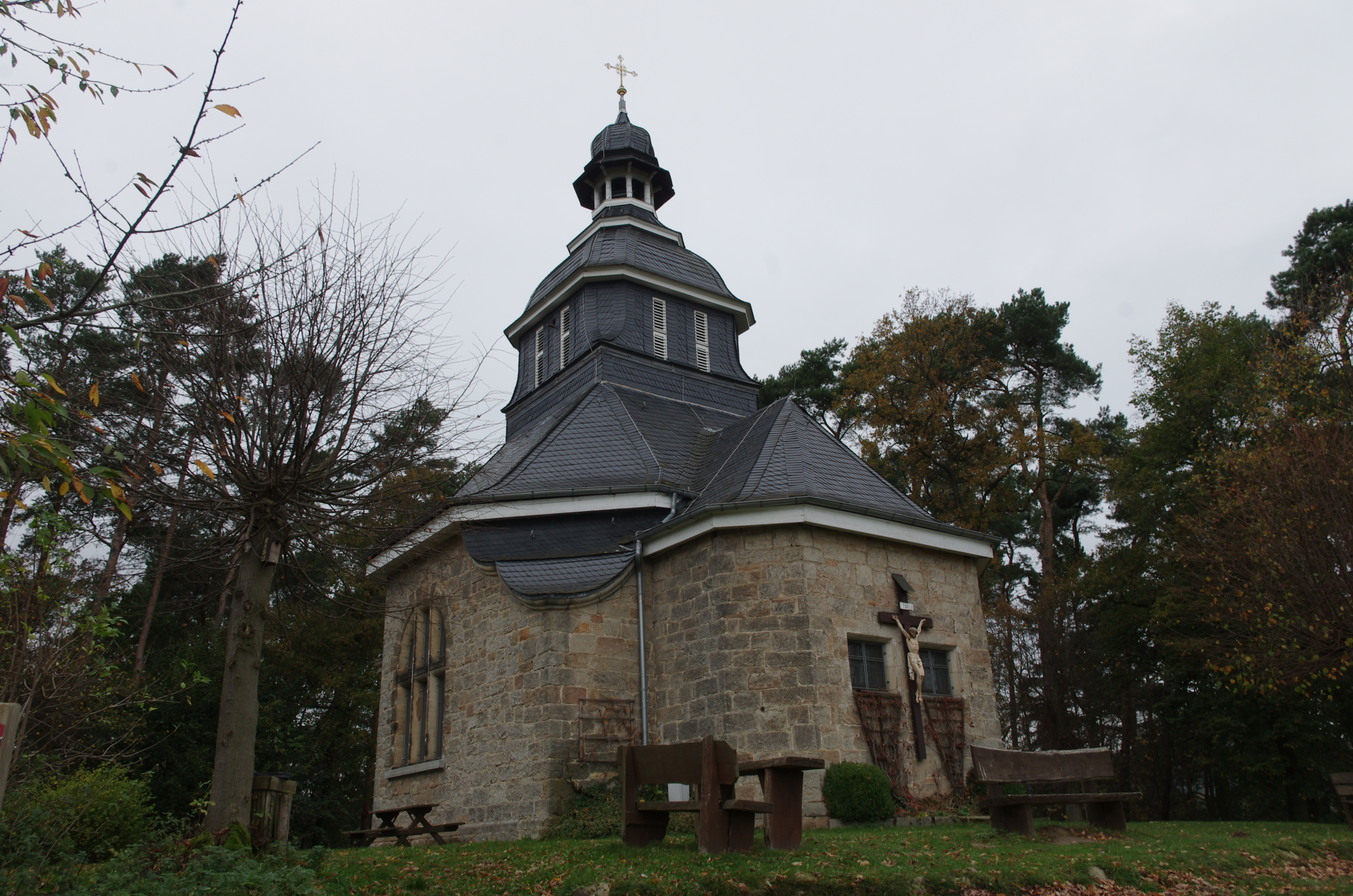 Naumburg in Hessen. Die Weinbergkapelle befindet sich nördlich von Naumburg am Rand eines Waldes. ERbaut wurde die Kapelle 1911.